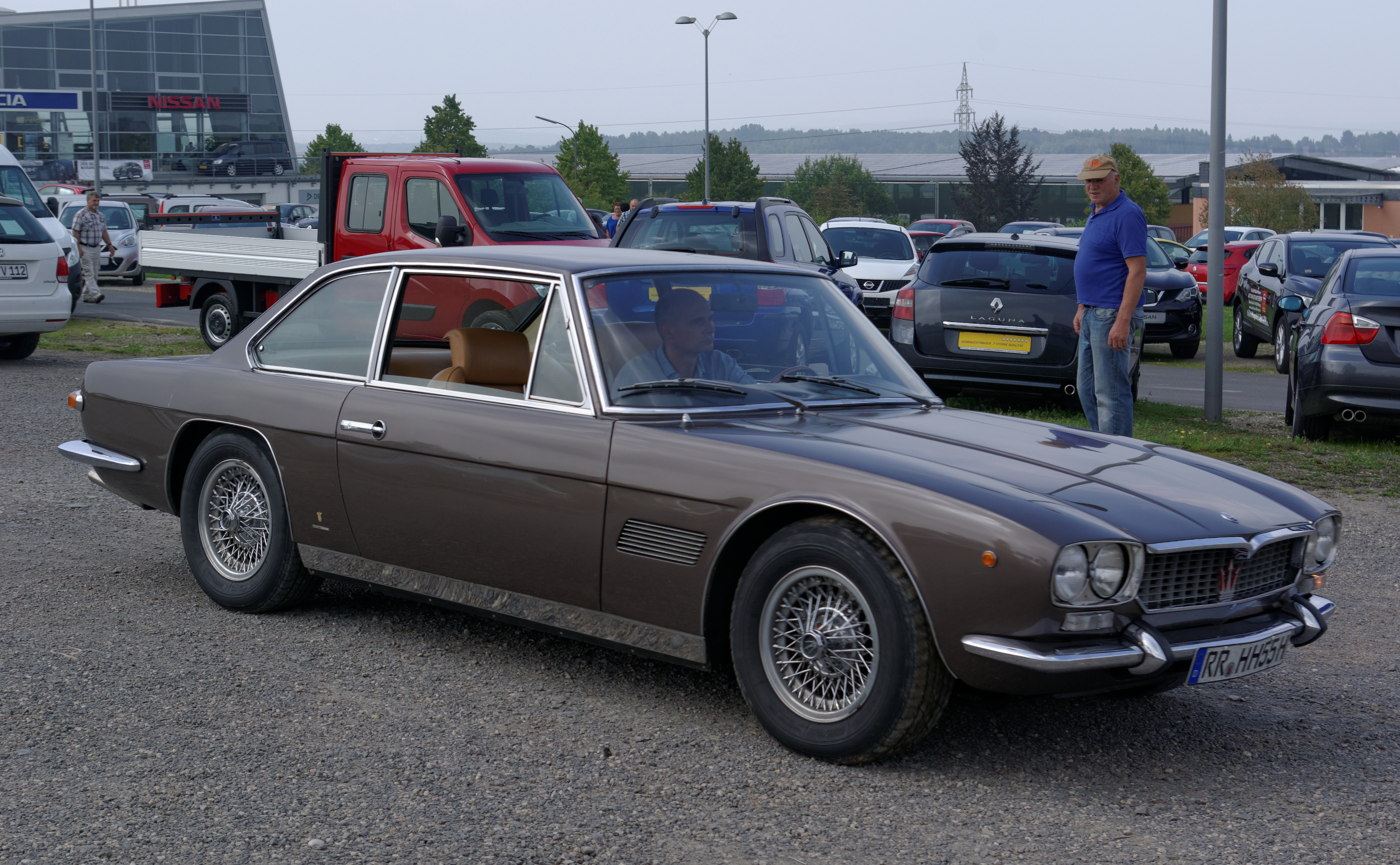 Maserati Mexico, Das Nummernschild ist verfälscht!